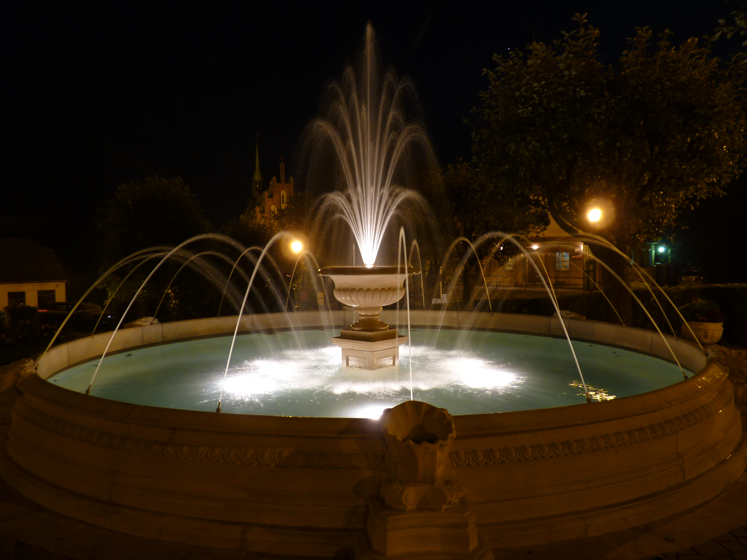 Rewitalizacja rynku w Czchowie. Fontanna.